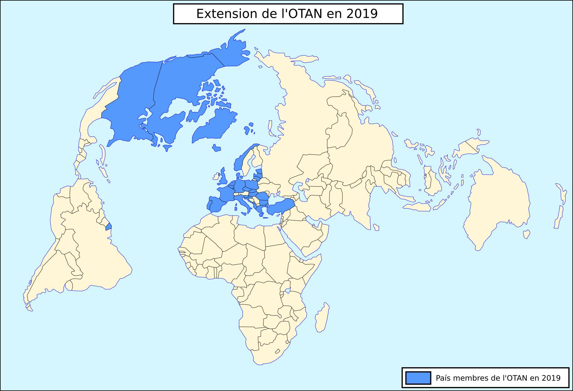 Extension de l'OTAN en 2019.